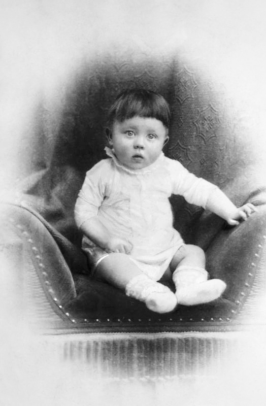 ADN-ZB Adolf Hitler faschistischer Führer, Hauptkriegsverbrecher. geb: 20.4.1889 in Braunau (Inn) gest: (Selbstmord) 30.4.1945 in Berlin Kinderbildnis